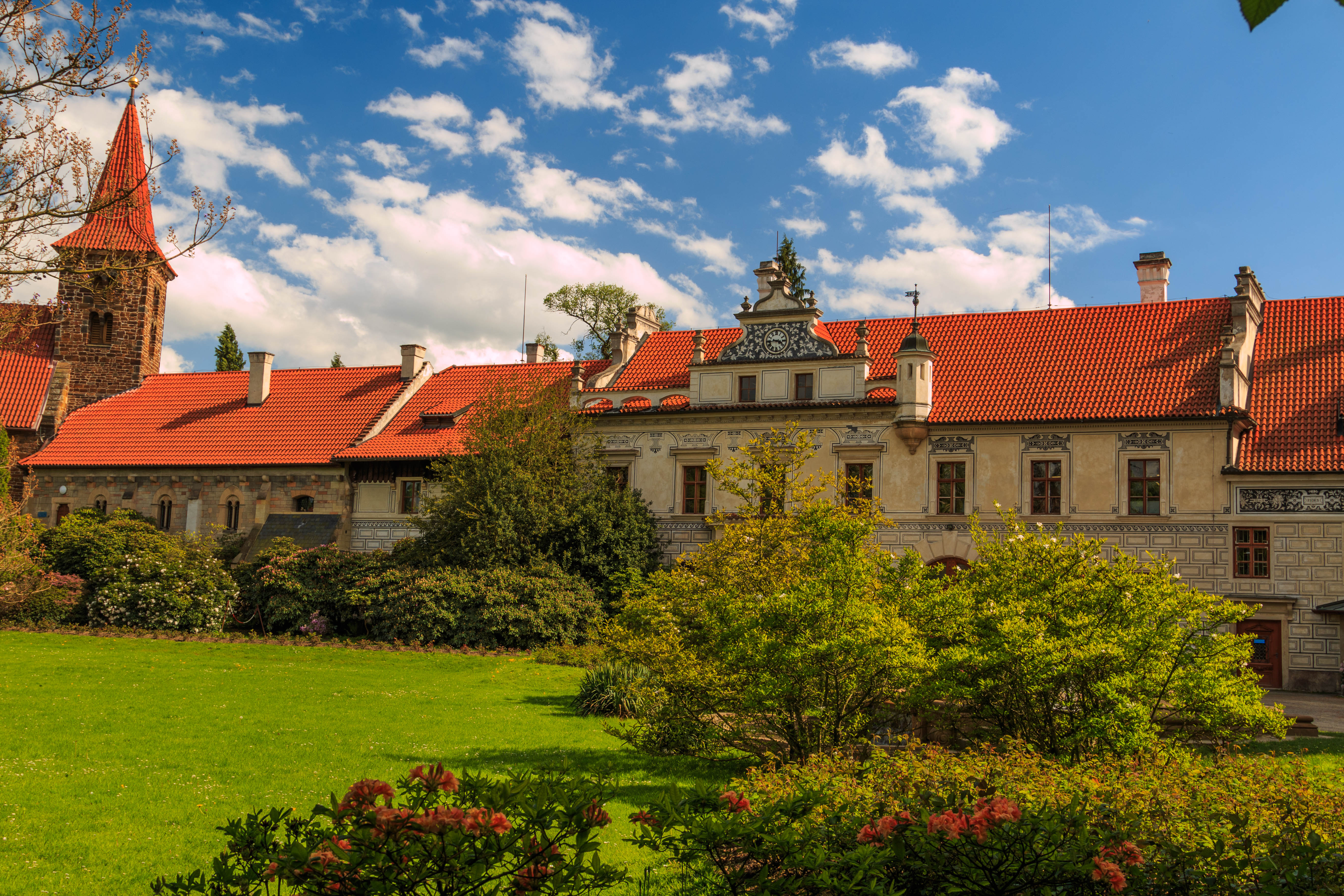 Zámek Průhonice, Průhonice, Osnice, Zdiměřice, Dobřejovice, Průhonice. Project: Chráněná území.